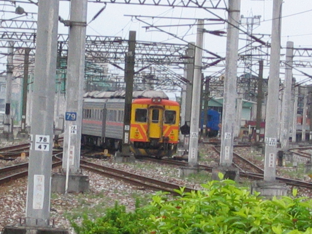 中文（台灣）: 此檔案為本人親自攝影